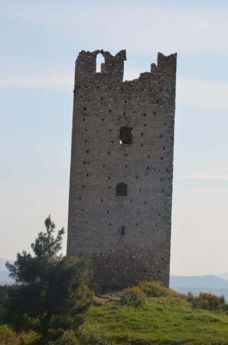 Δίδυμοι Πύργοι Μύτικας Ευβοίας ( 2ος Πύργος )